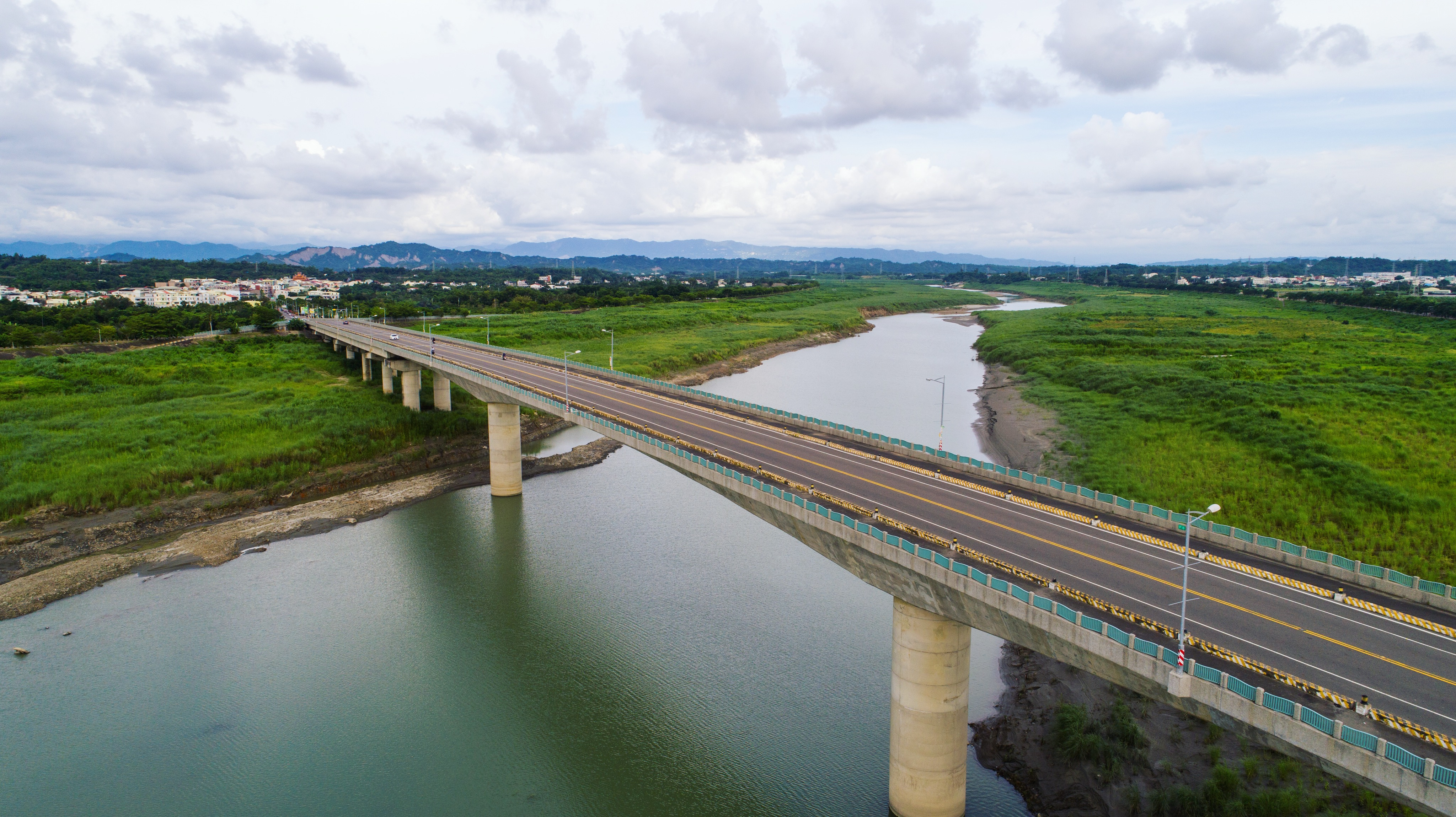 中文（台灣）: 台南市大內區大內橋